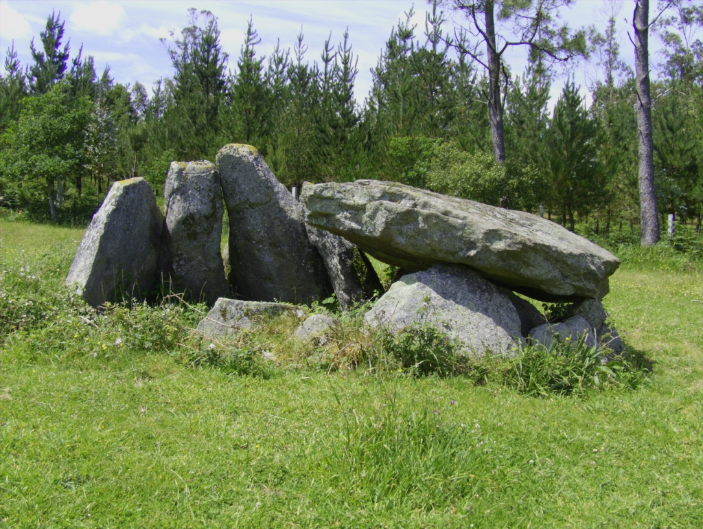 Dolmen de Mina da Perxubeira. Mazaricos - A CoruñaDolmen Mina da Perxubeira